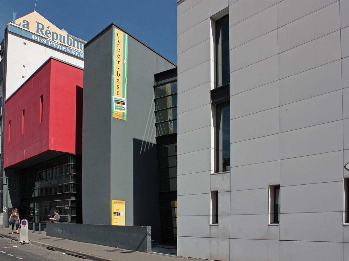 La Cyber-Base Pau Pyrénées, rue Despourrins à Pau